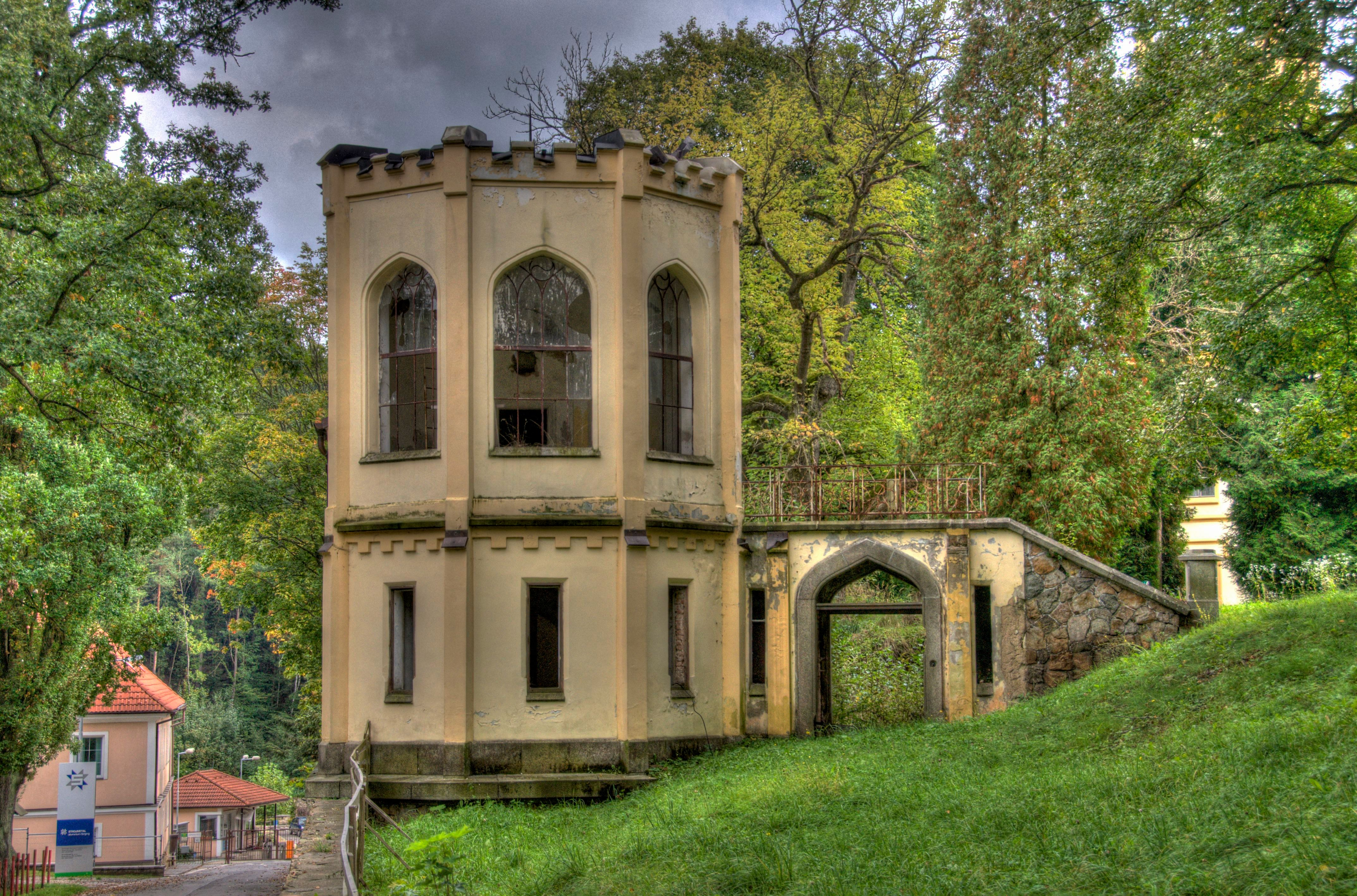 Pavilon z 19. století v areálu zámku Kamenice při pohledu od severozápadu